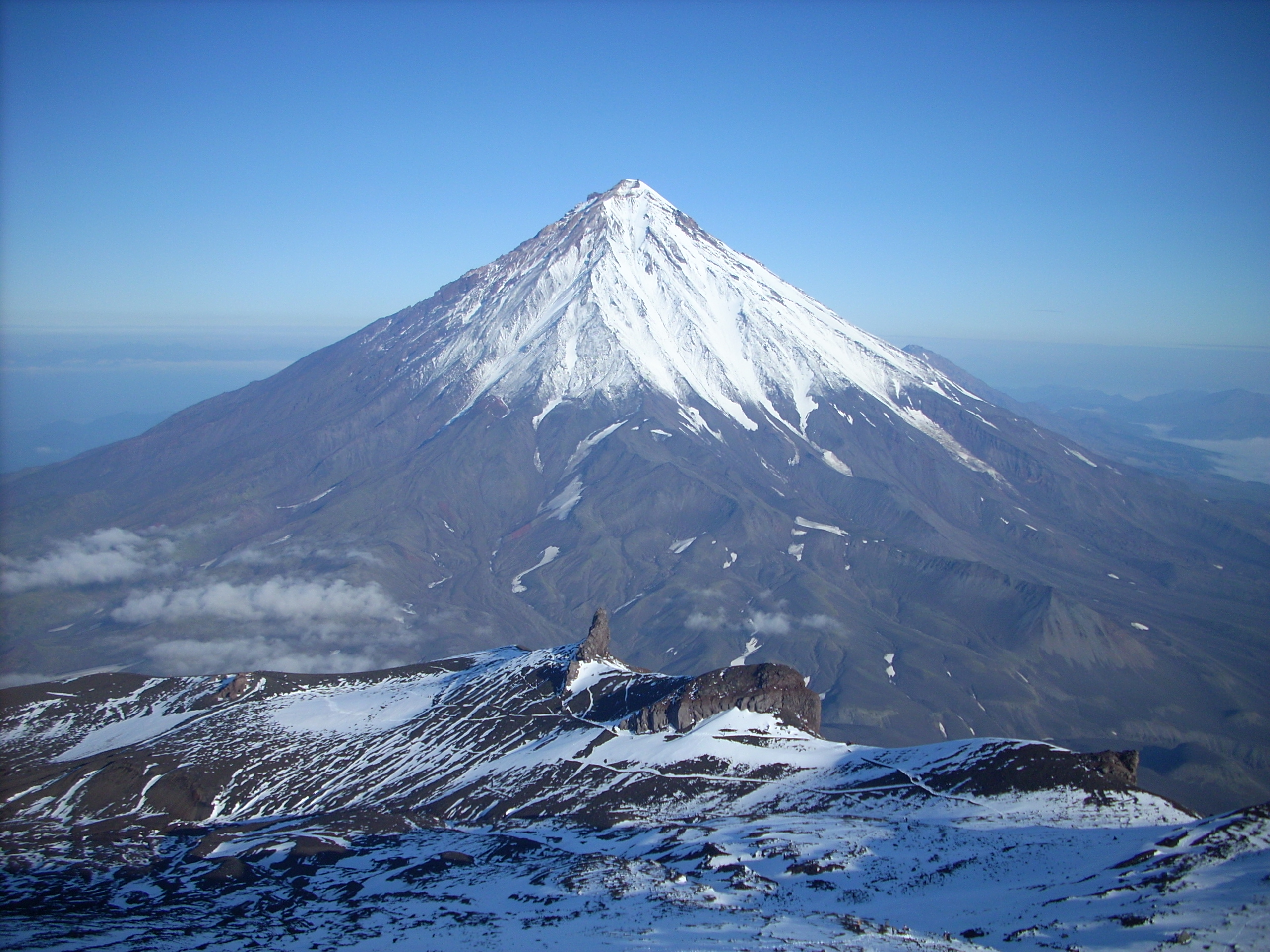 Корякский вулкан, 2008 год